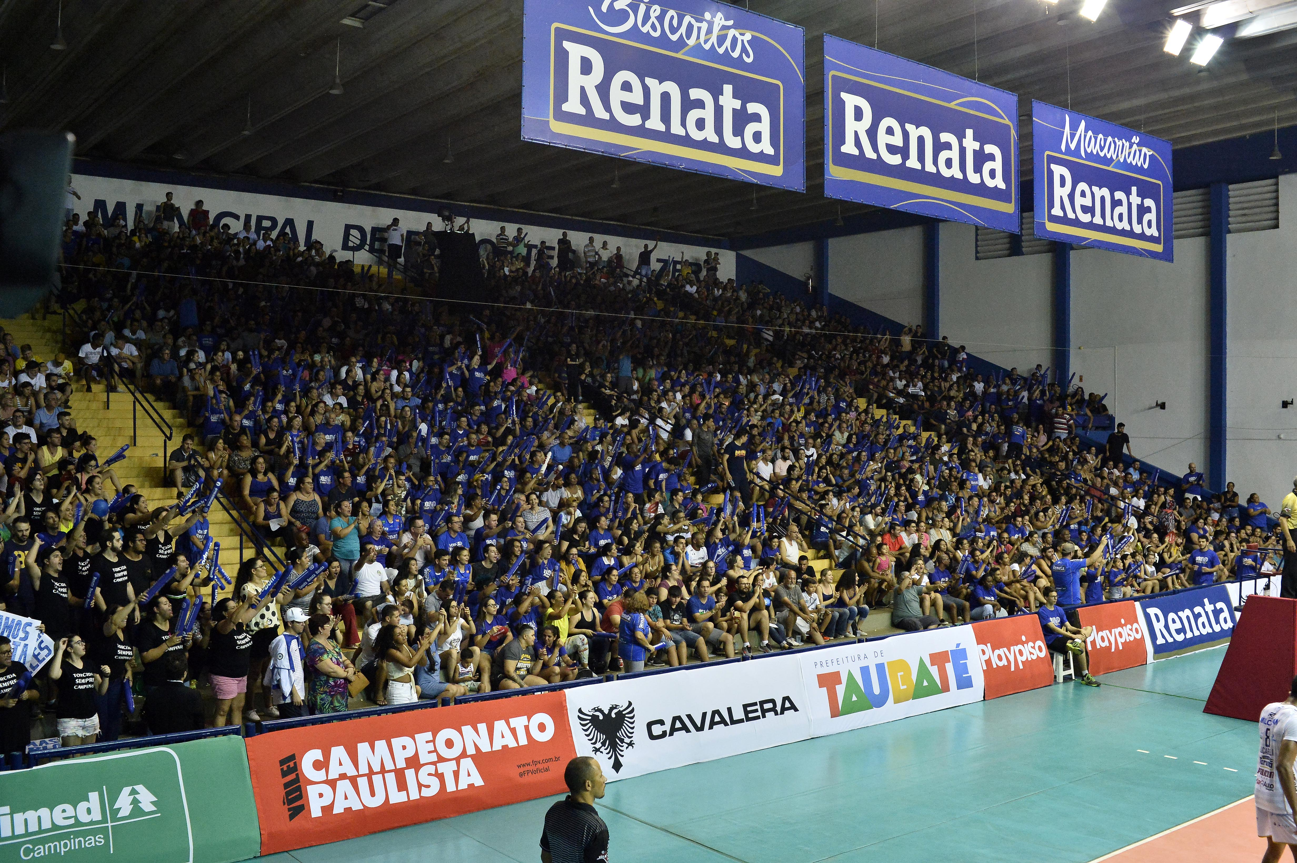 Final do Campeonato Paulista 2019/2020